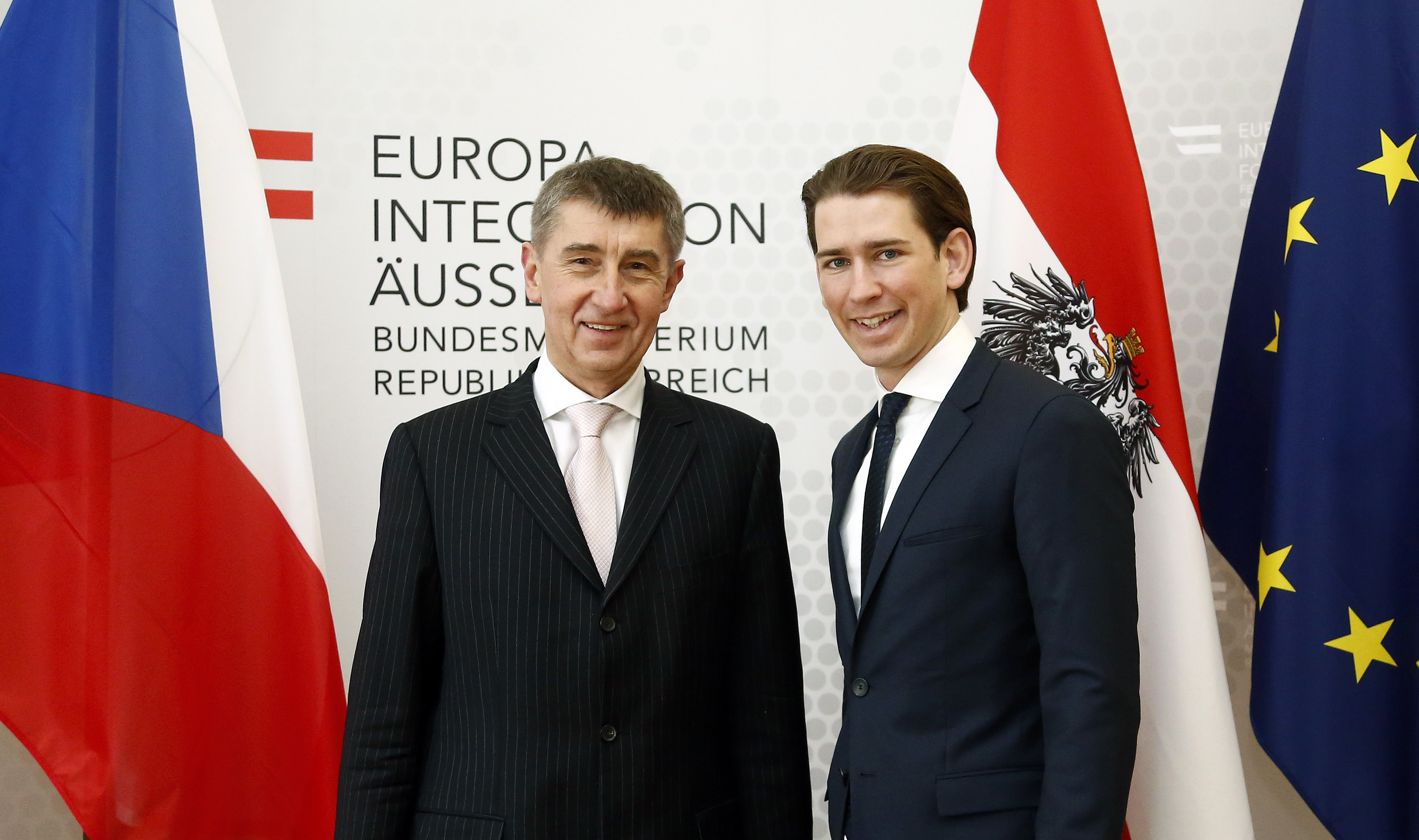 Bundesminister Sebastian Kurz trifft den tschechischen Vizepremier Andrej Babis. Wien, 13.02.2015, Foto: Dragan Tatic